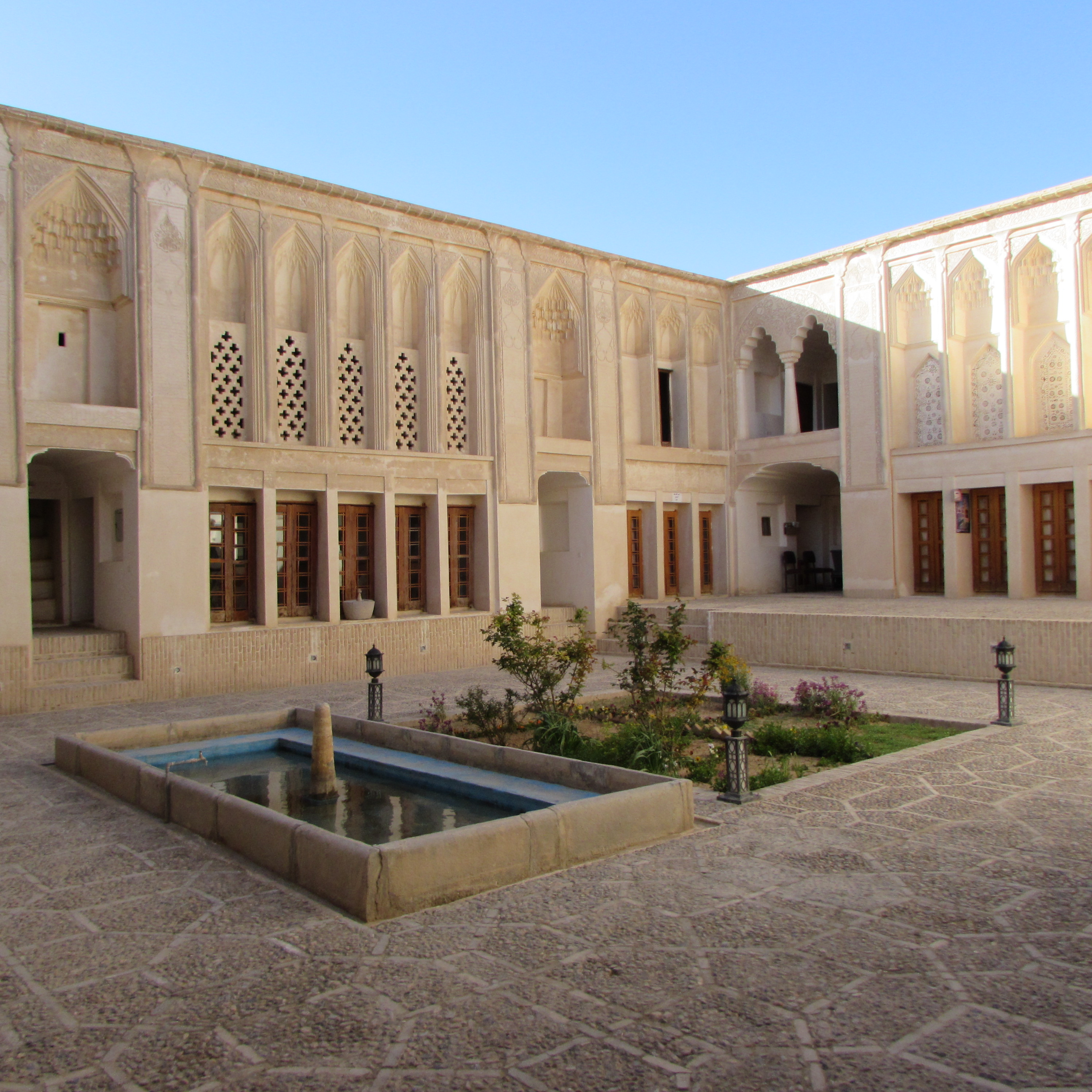 ضلع غربی و شمالی